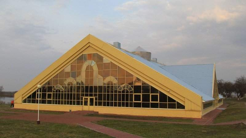 Тураў. Павільён над раскопкамі